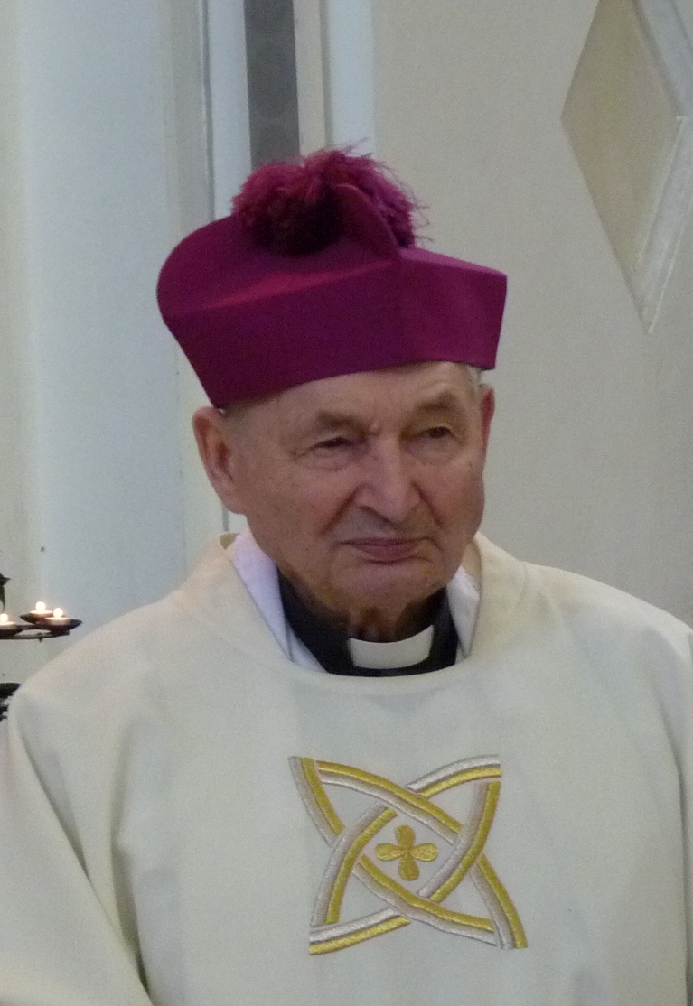 JM. can. Stanislav Bečička při Misse chrismatis 2011